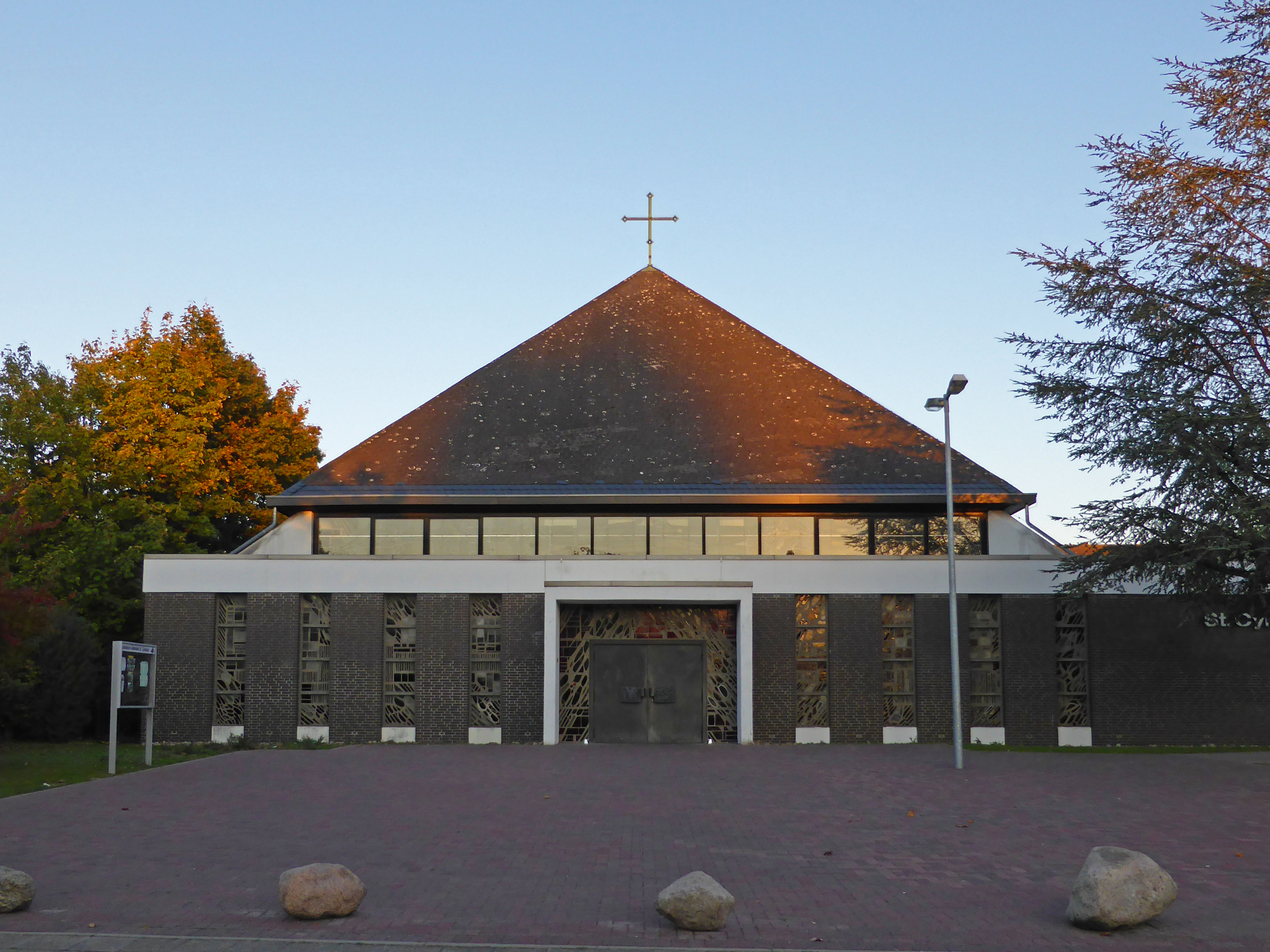 Katholische Cyriakuskirche (Braunschweig)